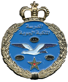 L'École Royale de l'Air est une grande école d’ingénieur et une prestigieuse école militaire marocaine formant des officiers aviateurs, située à Marrakech et créée en 1970.